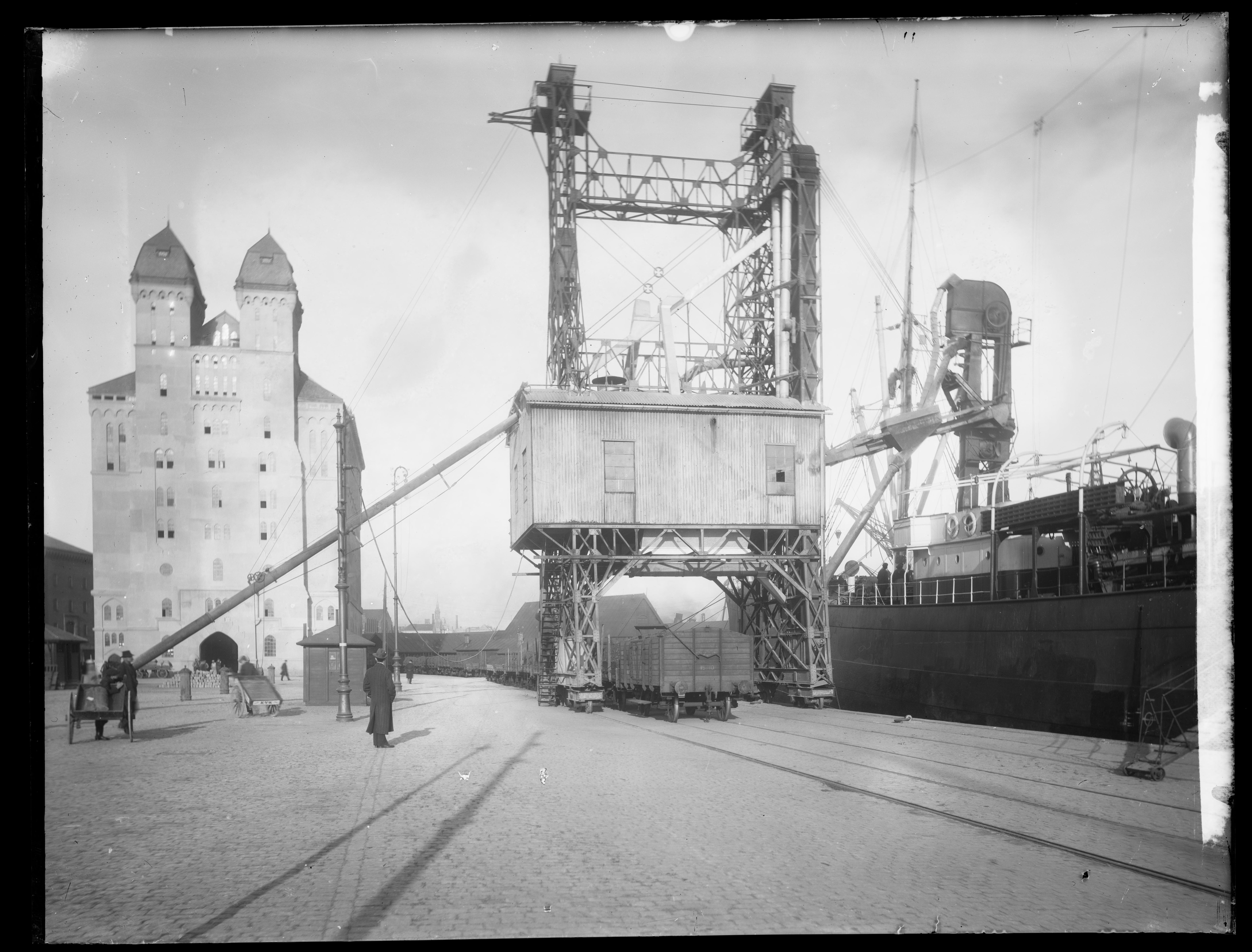 Bildet er hentet fra Nasjonalbibliotekets bildesamling. Anmerkninger til bildet var: Påskrift arkivark: Kornsiloen Eldste arkivnummer: 970 Yngre arkivnummer: 173 Oslo,Vippetangen, Oslo, Oslo